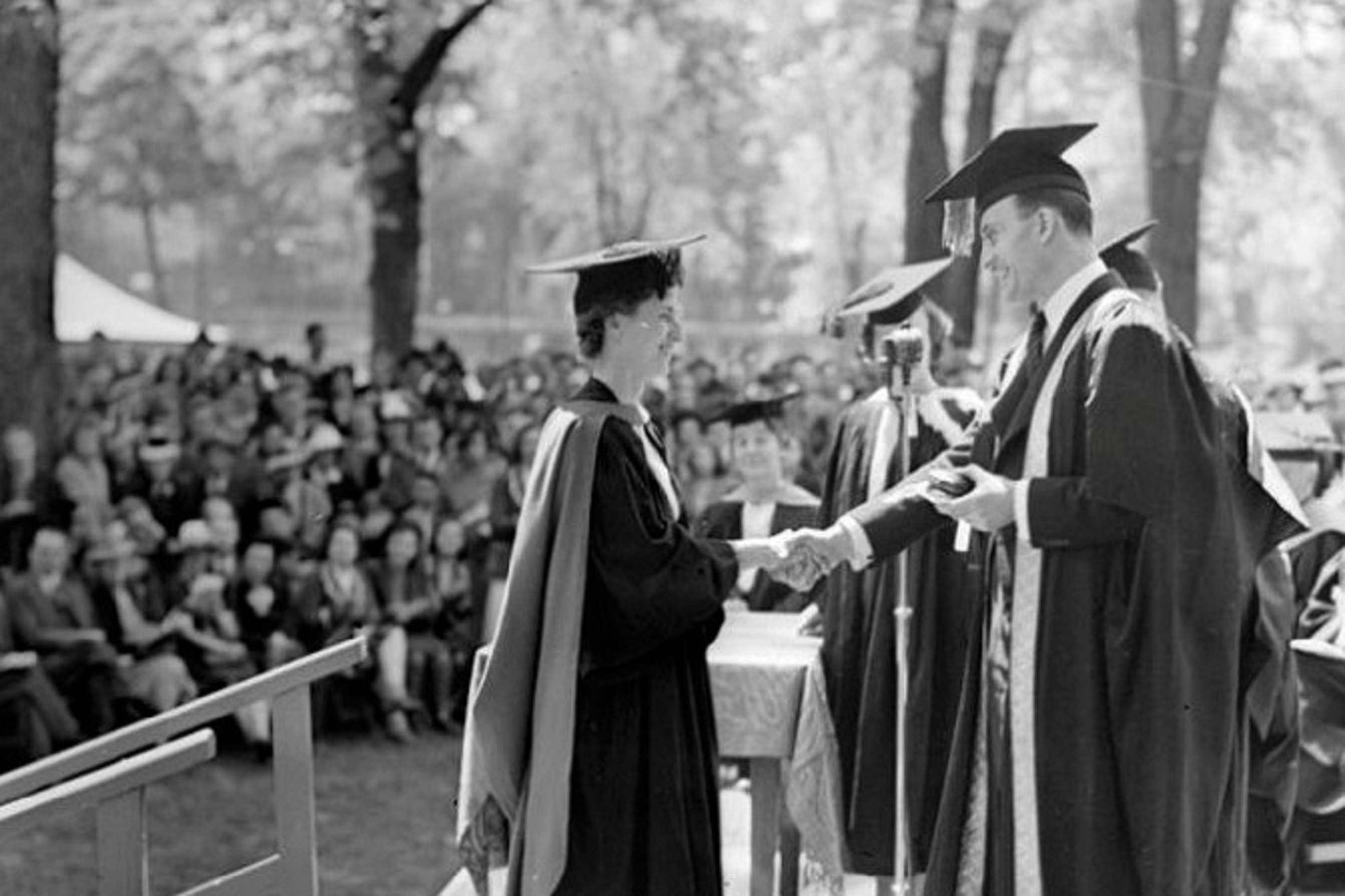 Une finissante en médecine, reçoit plusieurs prix lors la collation des grades de l'Université McGill, 30 may 1940.